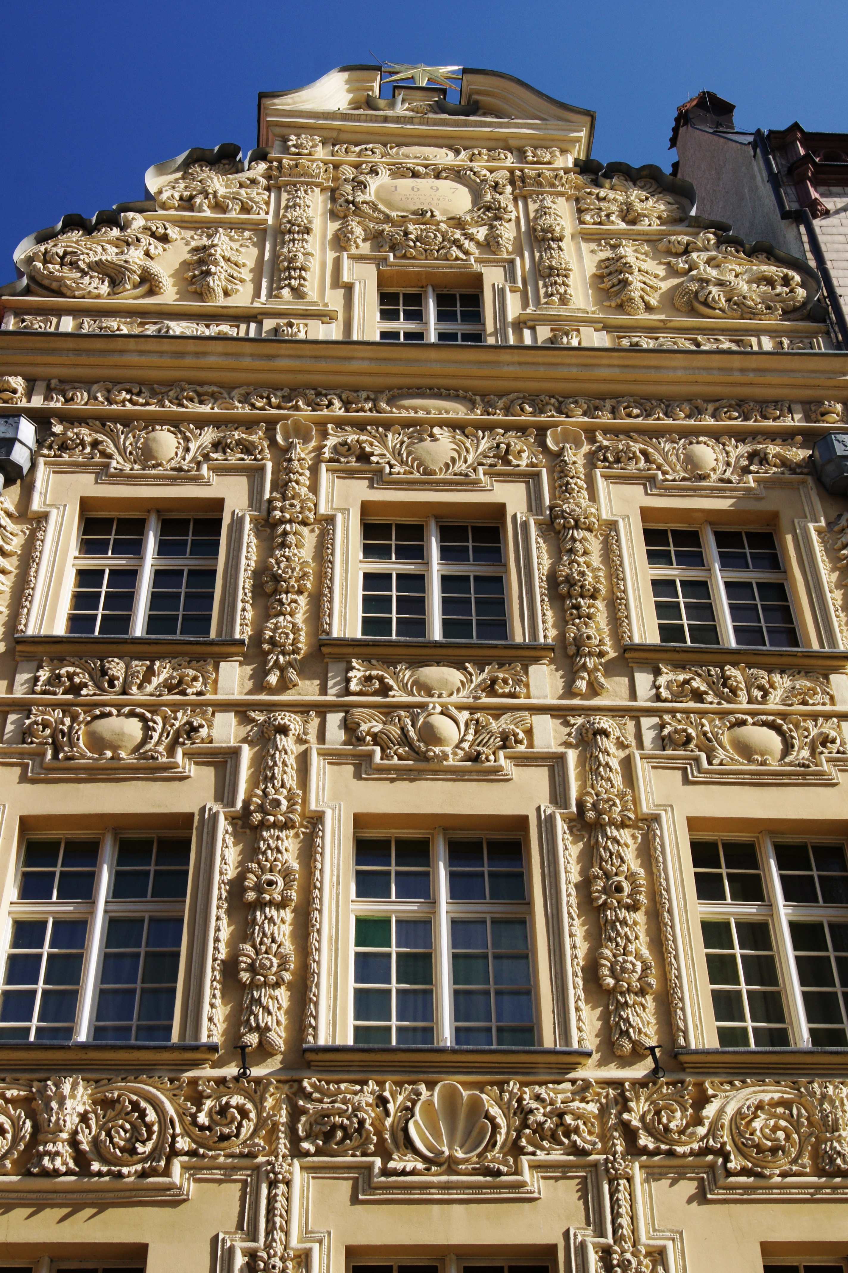 Toruń, Rynek Staromiejski 35 - kamienica „Pod Gwiazdą”, 2 poł. XIII, poł. XVI, 1697, 1967-1969 (zabytek nr rejestr. A/960)